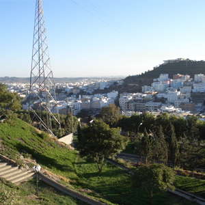 Abha city southern Saudi Arabia,مدينة أبها جنوب المملكة العربية السعودية.